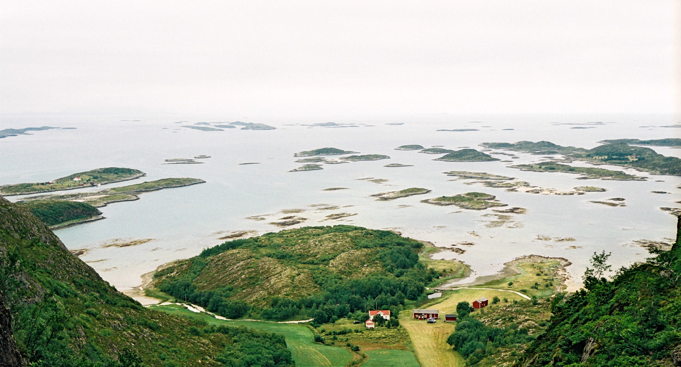 Utsikt fra Torghatten over strandflata på Helgelandskysten.